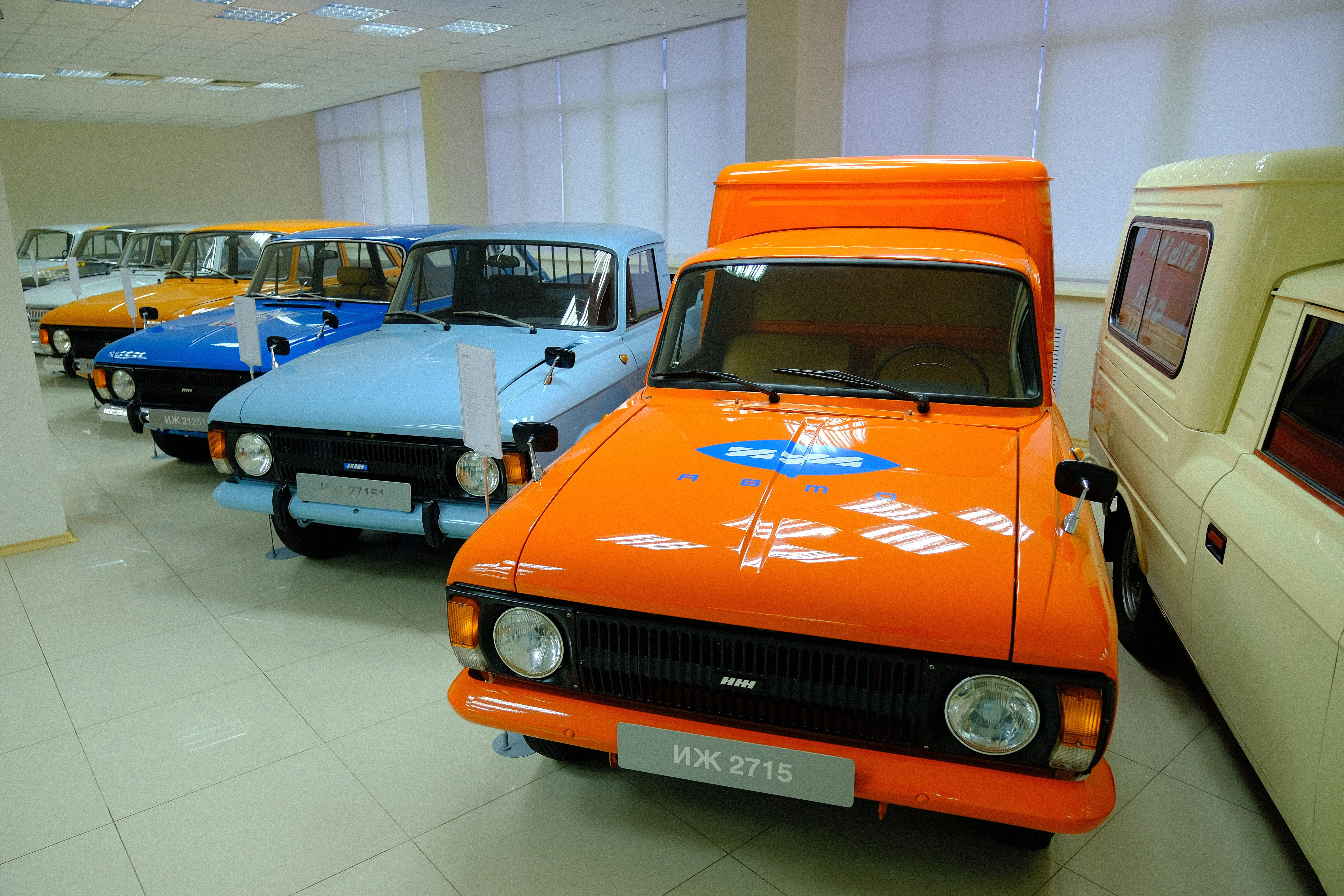 Экспозиция музея Ижевского автозавода